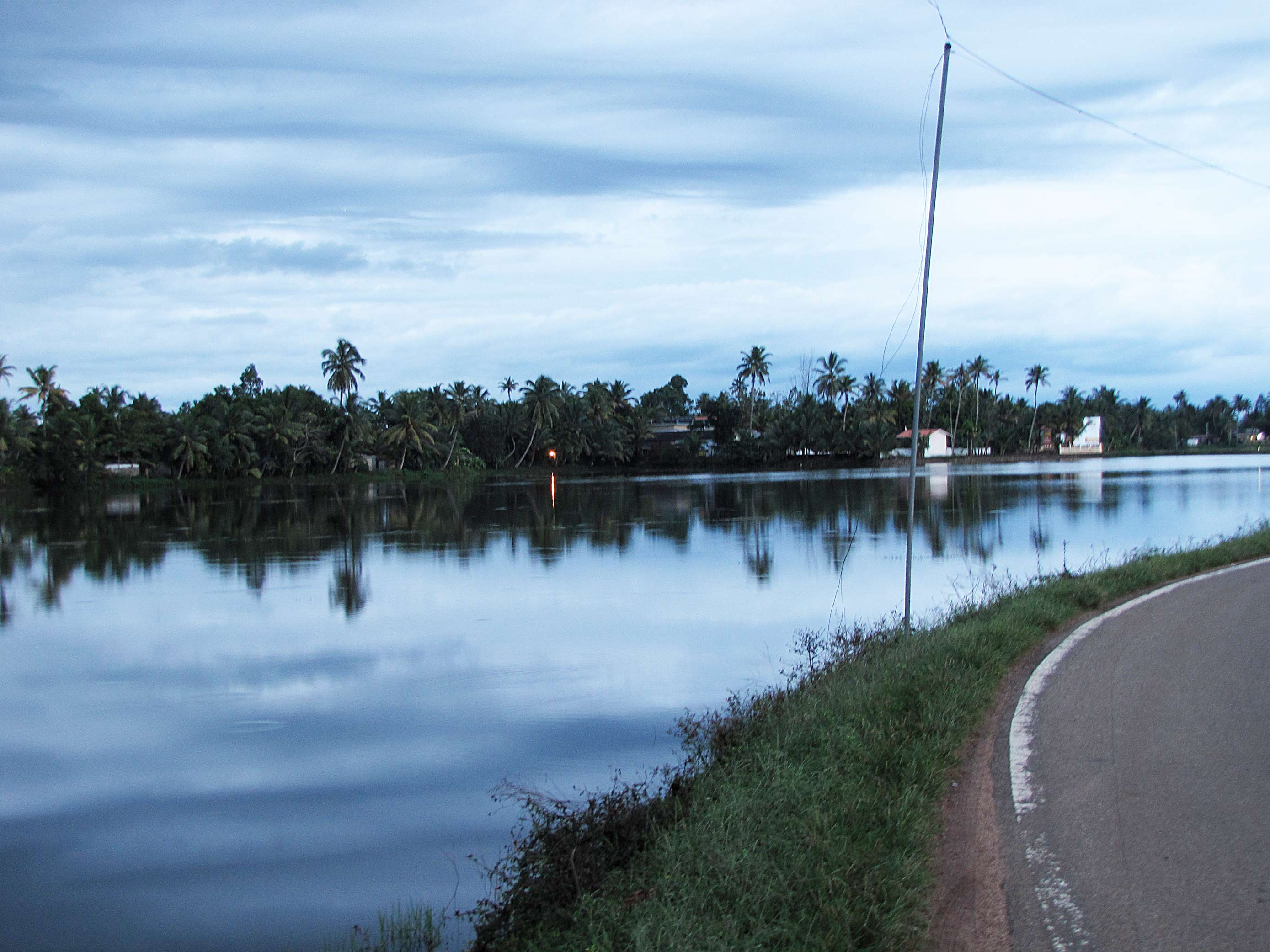 മുട്ടാർ ഗ്രാമത്തിൽ നിന്നുള്ള ഒരു ചിത്രം